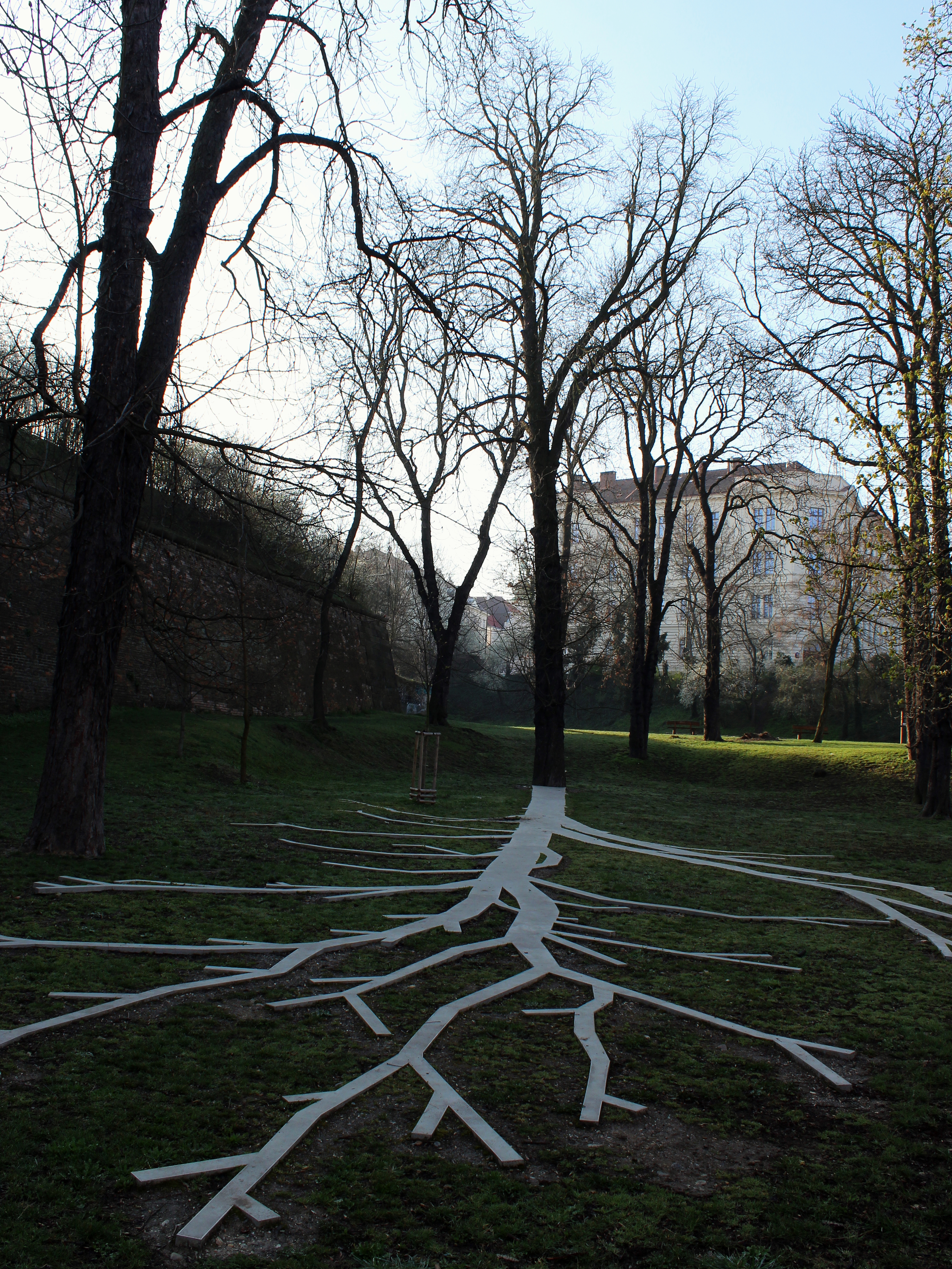 Praha